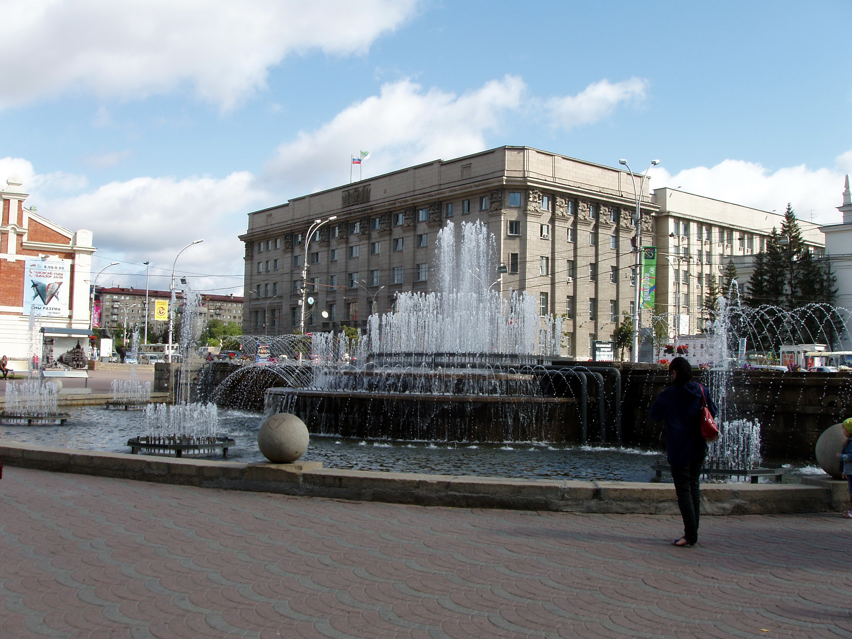 Фонтан в Первомайском сквере города Новосибирска. На заднем плане - Здание мэрии Новосибирска